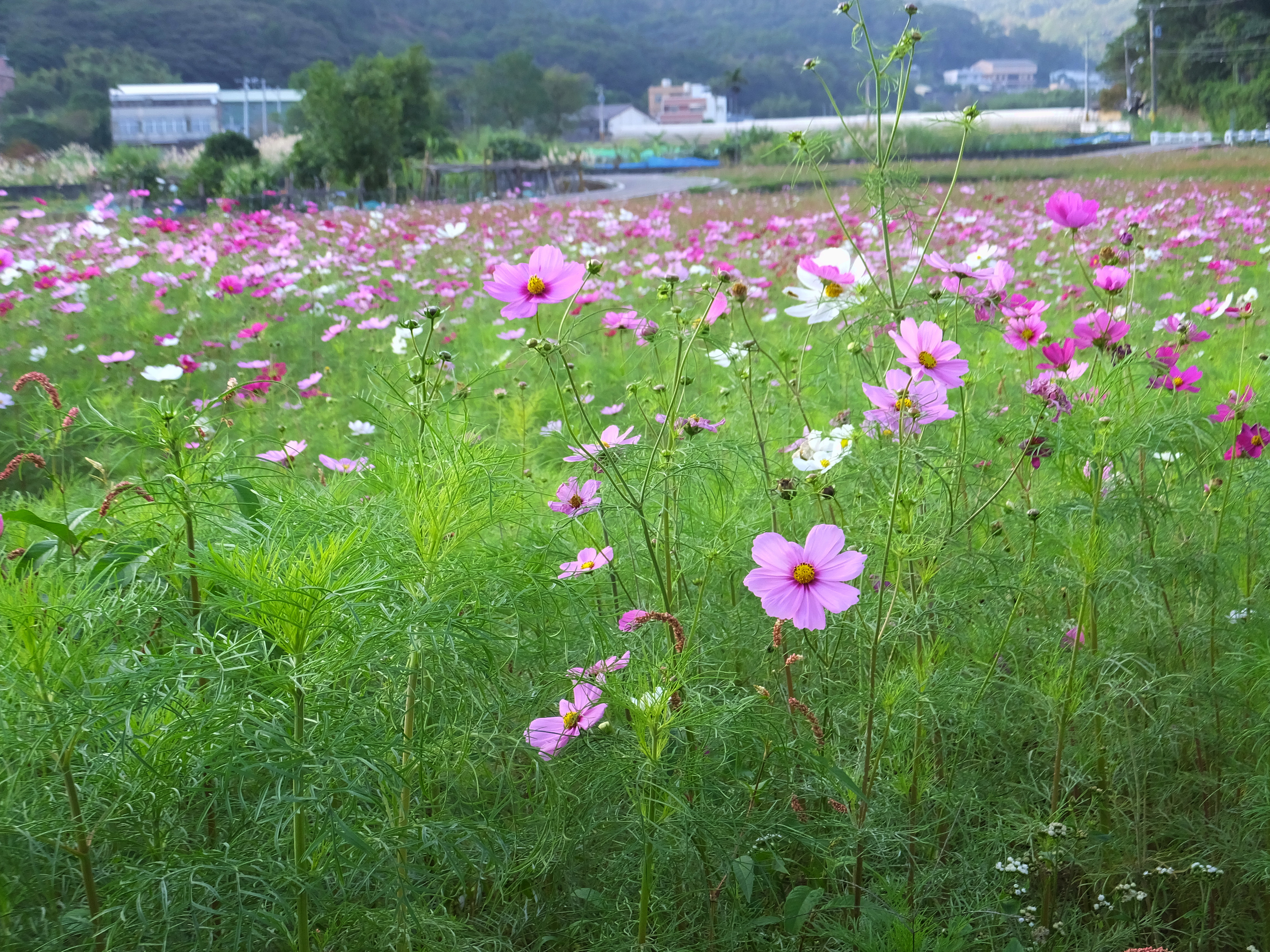 楓樹坑花海 Fengshukeng flower field